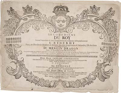 Affisch, Teater, Program, Bollhuset, Molière